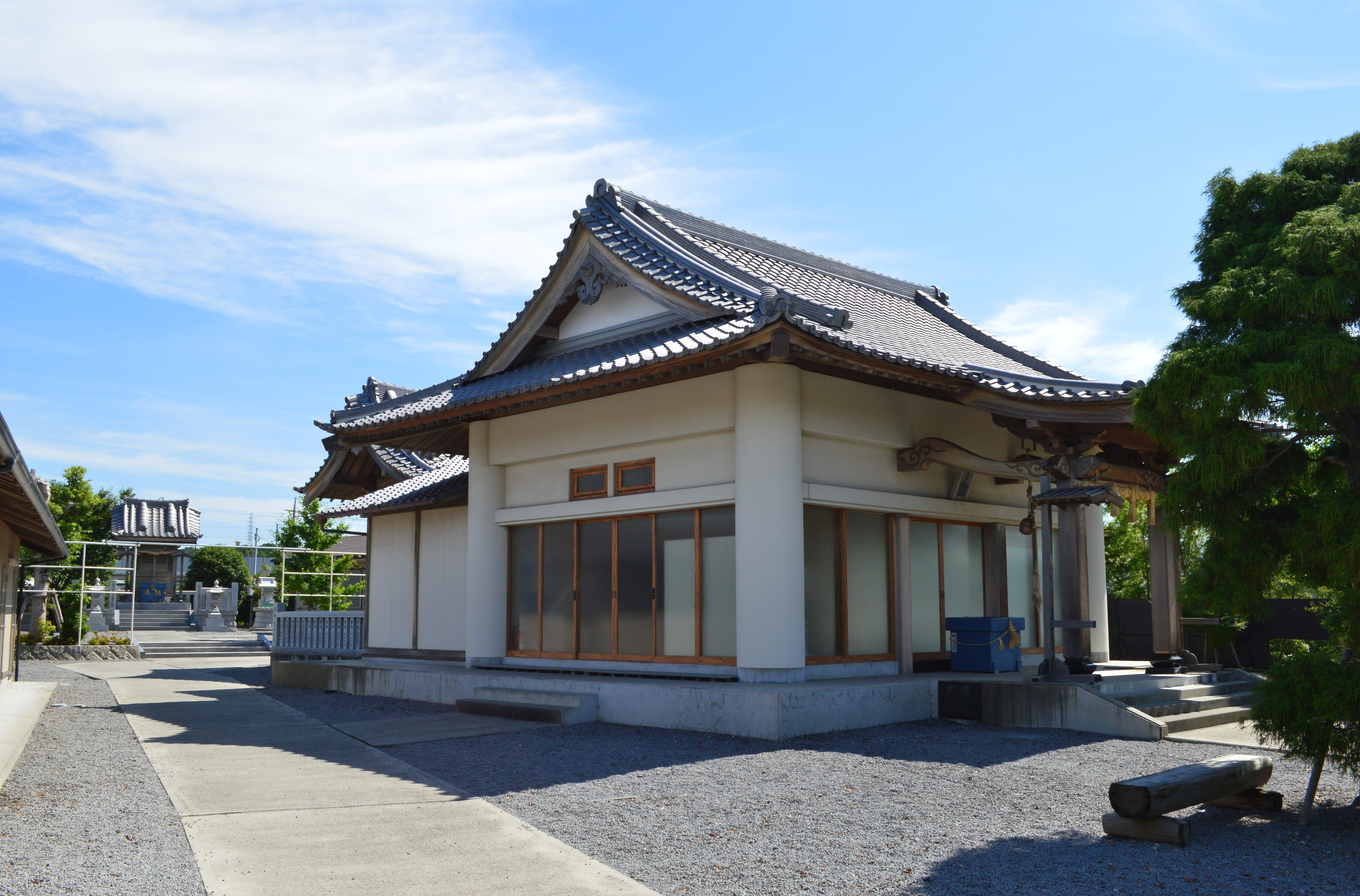 熊野神社と高尾山穂見神社